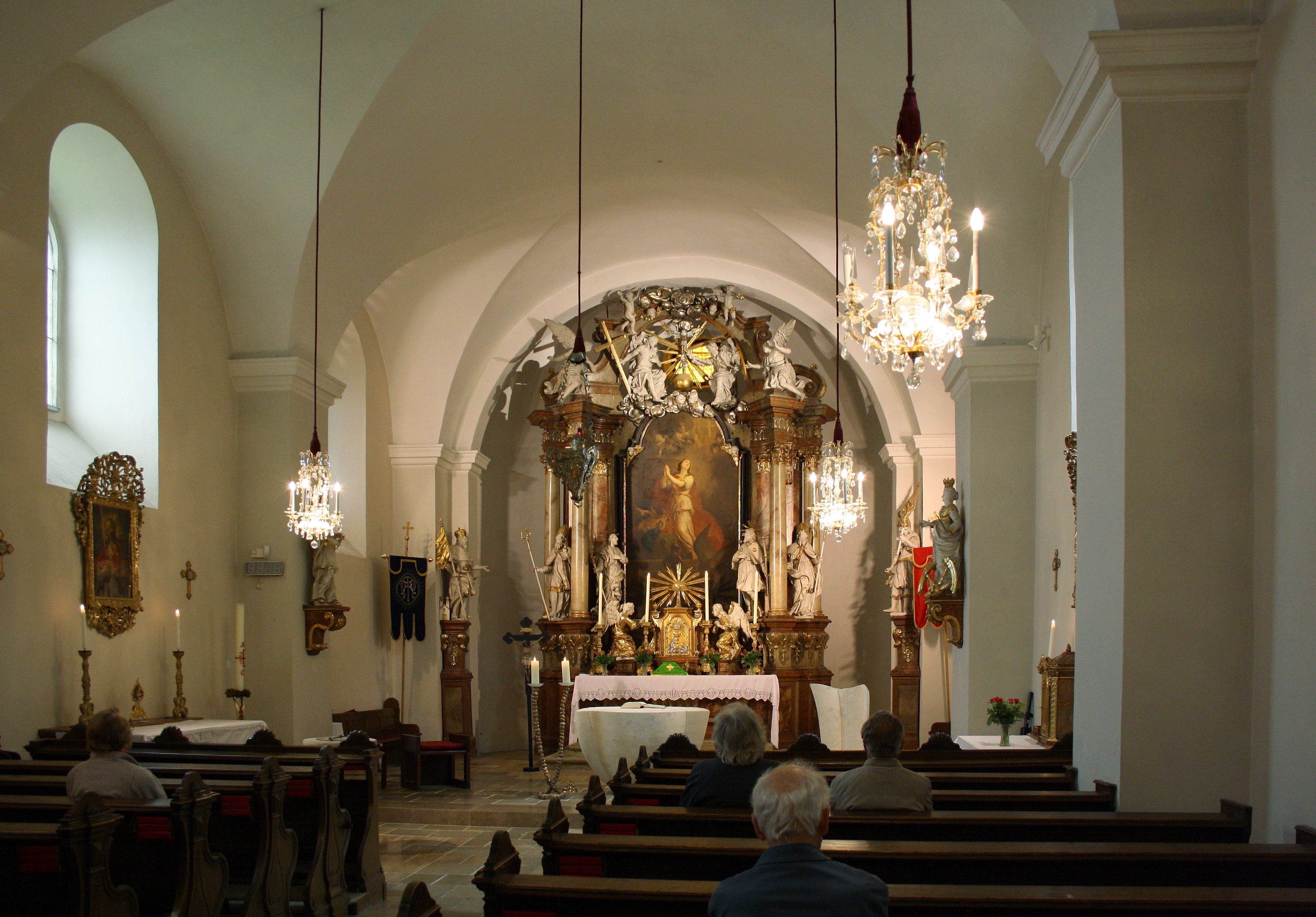 Innenansicht Richtung Altar der Pfarrkirche Höflein an der Donau in Niederösterreich.